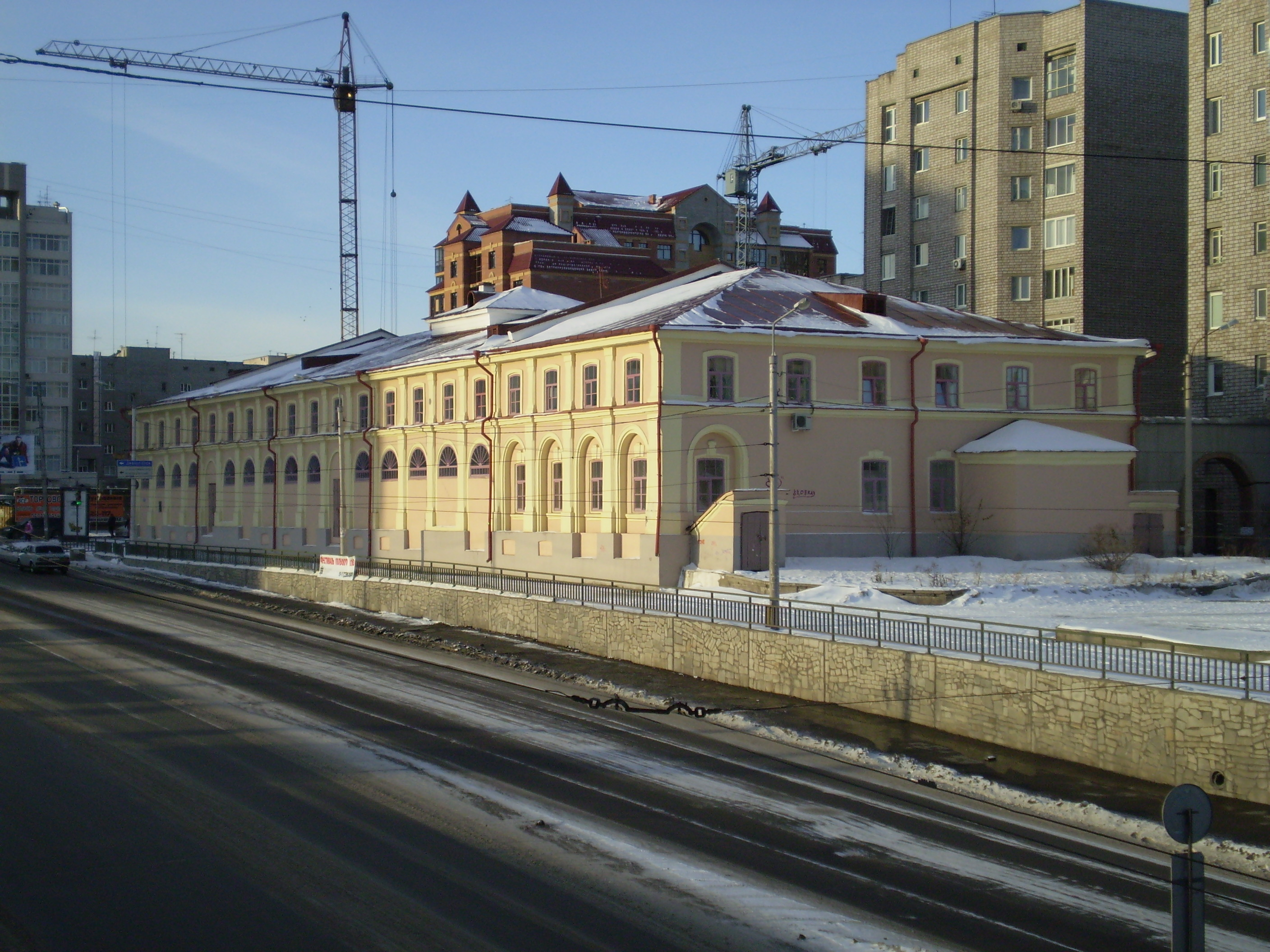 Гостиный двор. г. Красноярск. 1857-1865